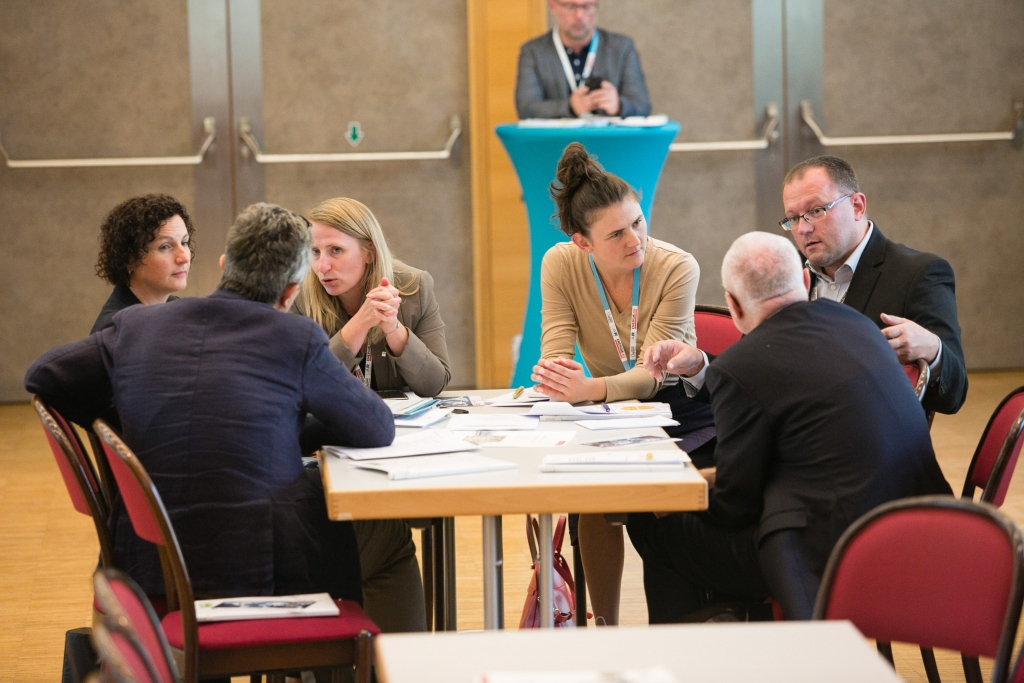 EDM B2B-Börse